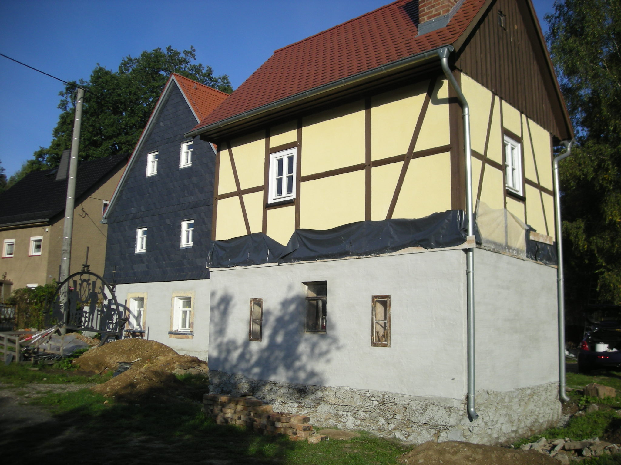 Das erhaltene Gebäudeensemble des ehemaligen Amtshauses in Herrnsdorf/Wolkenburg.